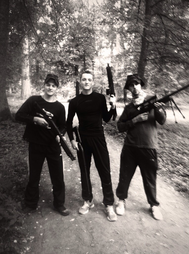 Airsoft spēlētāji Latvijā, Mazsalacā.